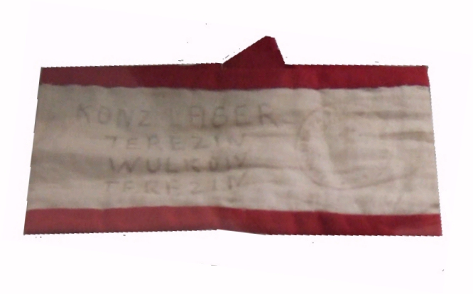 Armbinde aus dem KZ Theresienstadt, die die Bonner Jüdin Else Waldmann während ihrer Gefangenschaft tragen musste Aufschrift: „KONZ LAGER“ „TEREZIN“ „WULKOW“ „TEREZIN“ Fundort: „Gedenkstätte für die Opfer des Bonner Nationalsozialismus“ (Bonn) Aufnahme: 17.4.2006 Url